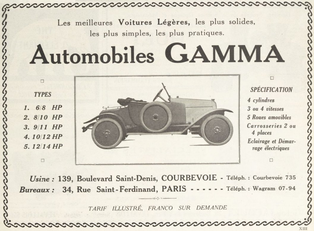 Adtvertisement for Automobiles Gamma, 1920